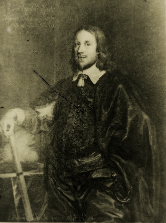 Johan De la Gardie (1582-1640)